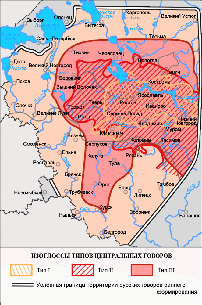 Карта говоров центральных территорий русского языка. Источники: Захарова К. Ф., Орлова В. Г. Диалектное членение русского языка — 2-е изд. — М.: Едиториал УРСС, 2004. — ISBN 5-354-00917-0, с. 60. Бромлей С. В., Булатова Л. Н., Захарова К. Ф. и др. Русская диалектология / Под ред. Л. Л. Касаткина — 2-е изд., перераб. — М.: Просвещение, 1989. — ISBN 5-09-000870-1, с. 205—206]